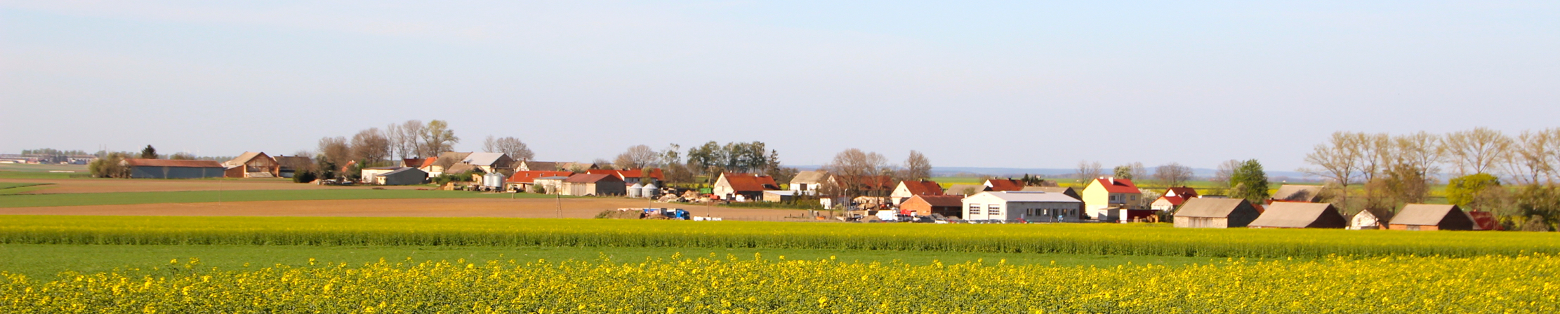 Szonów – wieś w Polsce położona w województwie opolskim, w powiecie prudnickim, w gminie Głogówek.